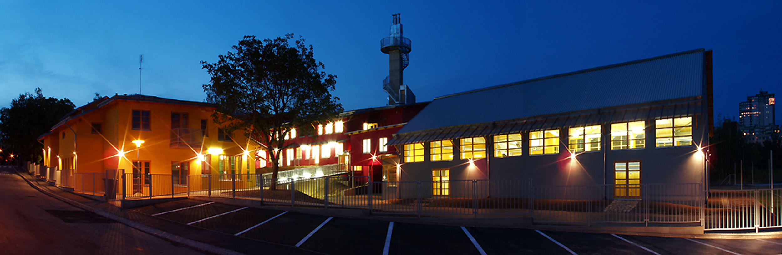 Dům dětí a mládeže Praha Modřany, architekt Vlado Milunić